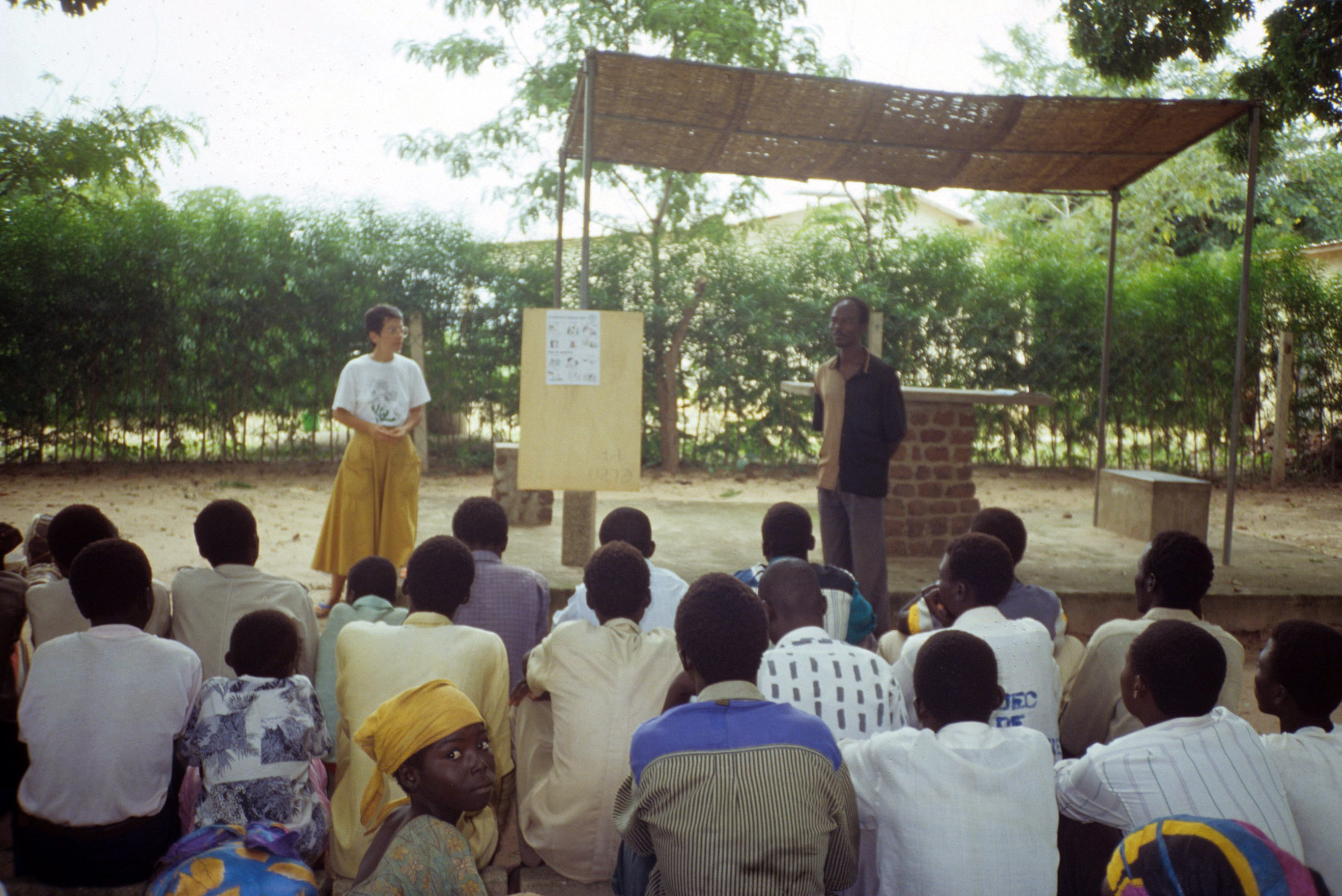 Foto personale 1998